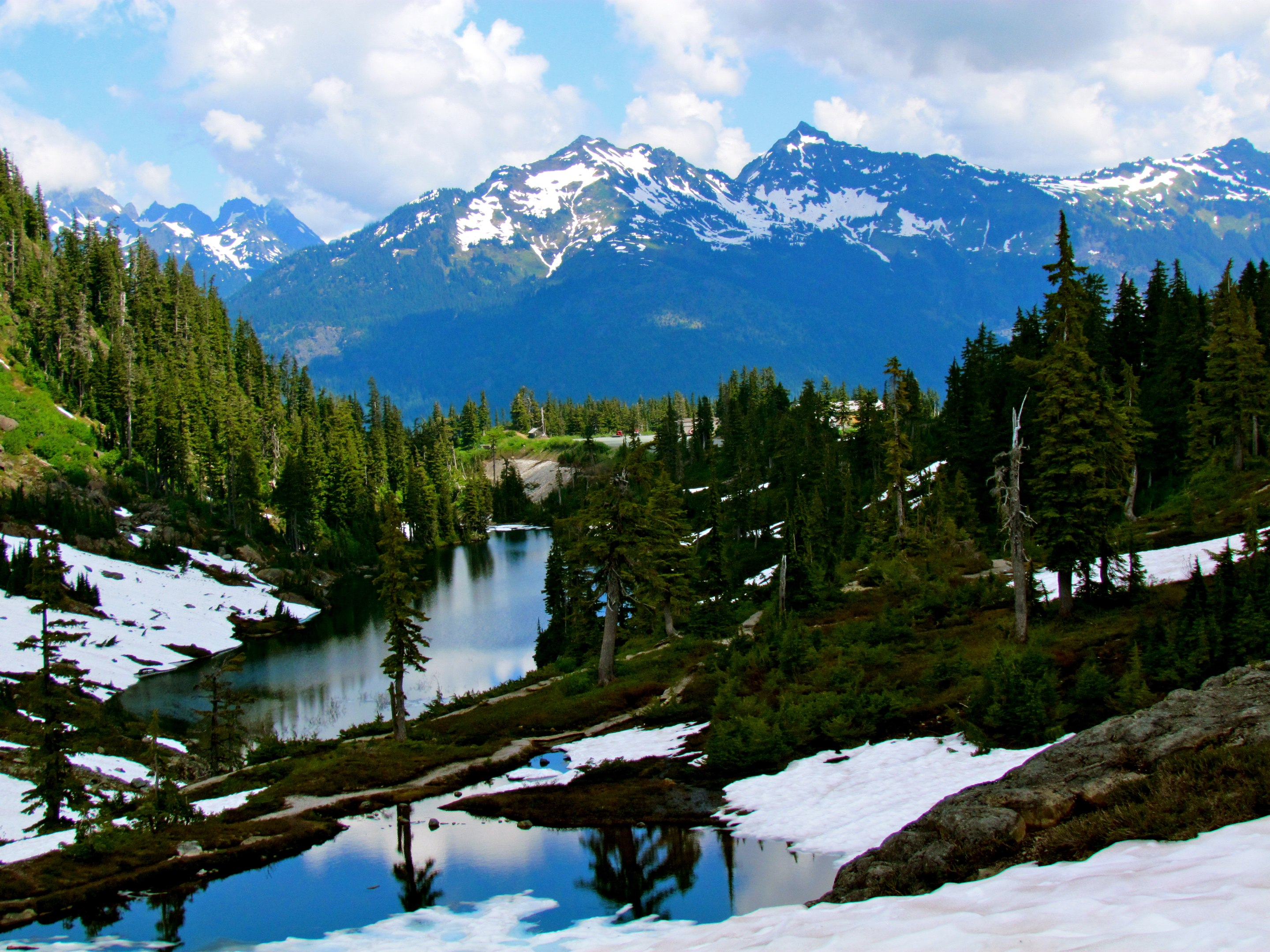 Artist Point